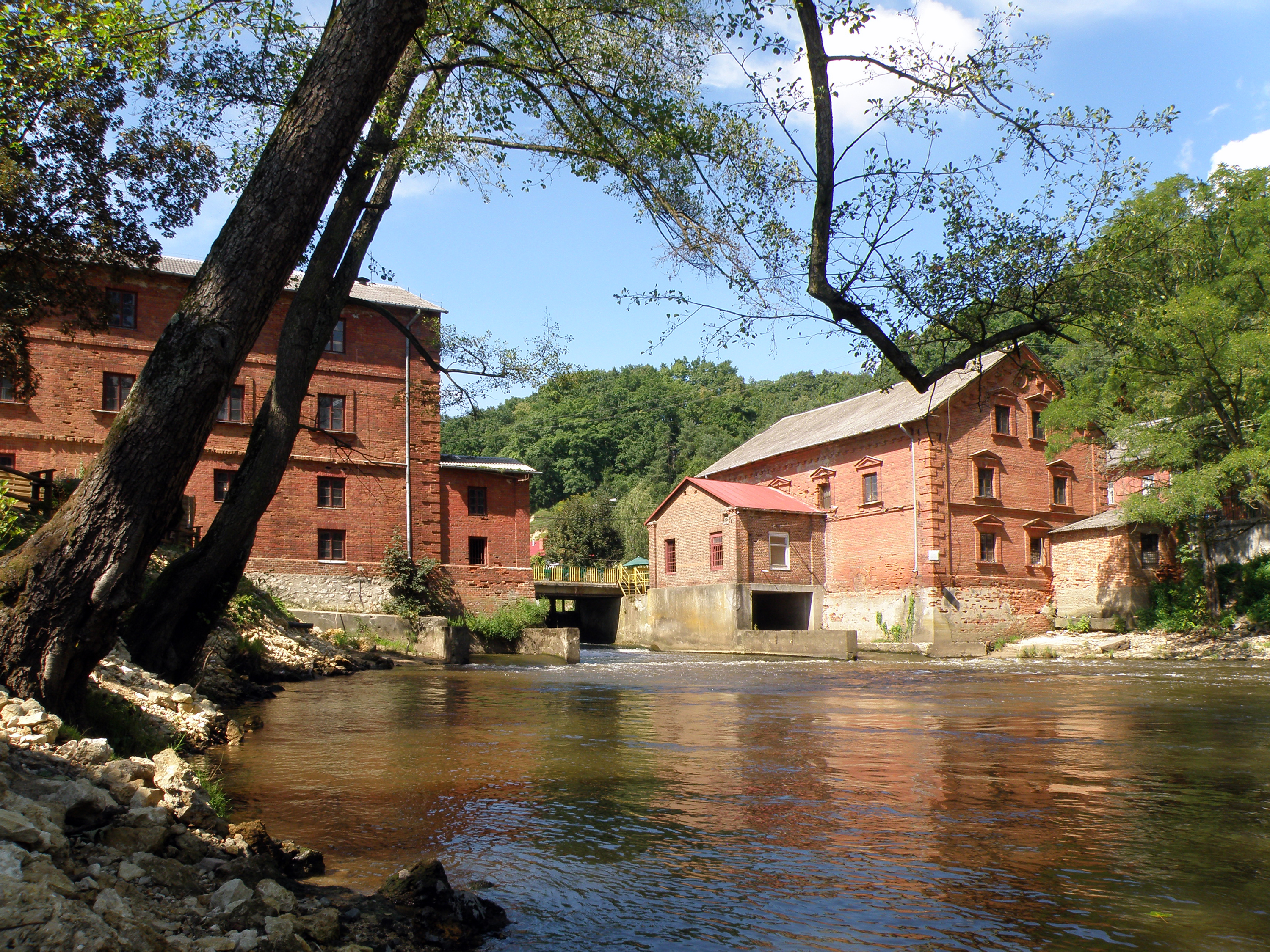 Bałtów - Młyn wodny z XIX w. na rzece Kamiennej